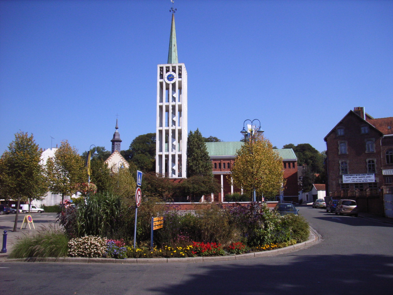 place de Saint-Pol-sur-Ternoise, l'église